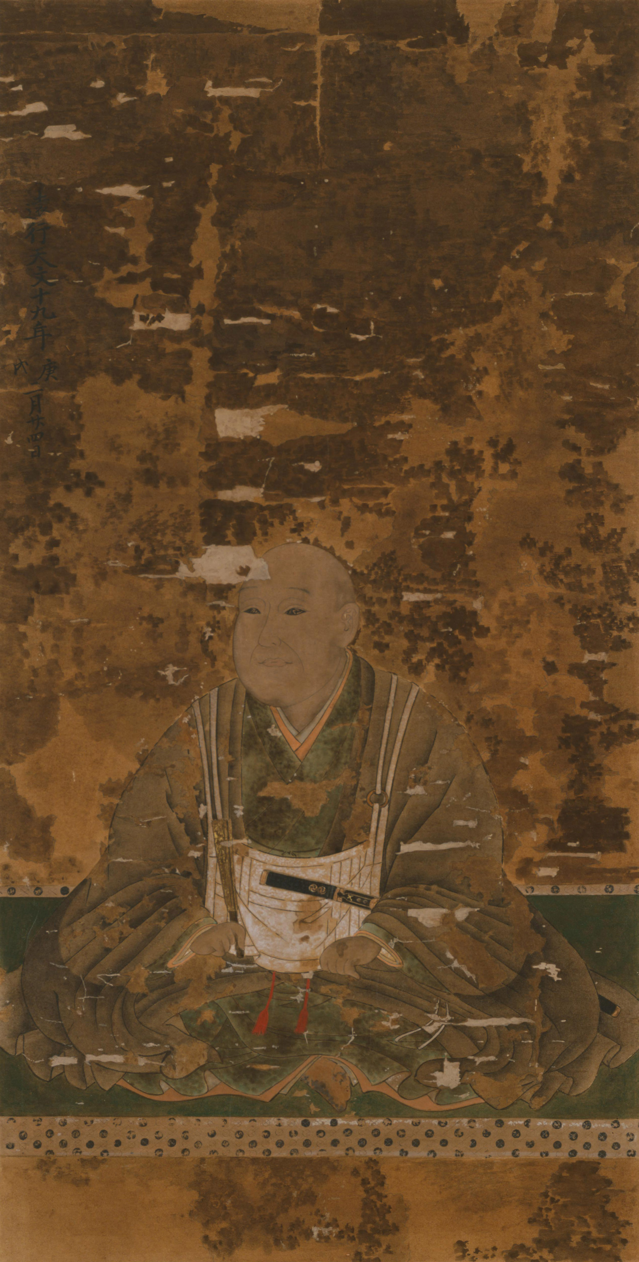 長尾憲長の肖像。